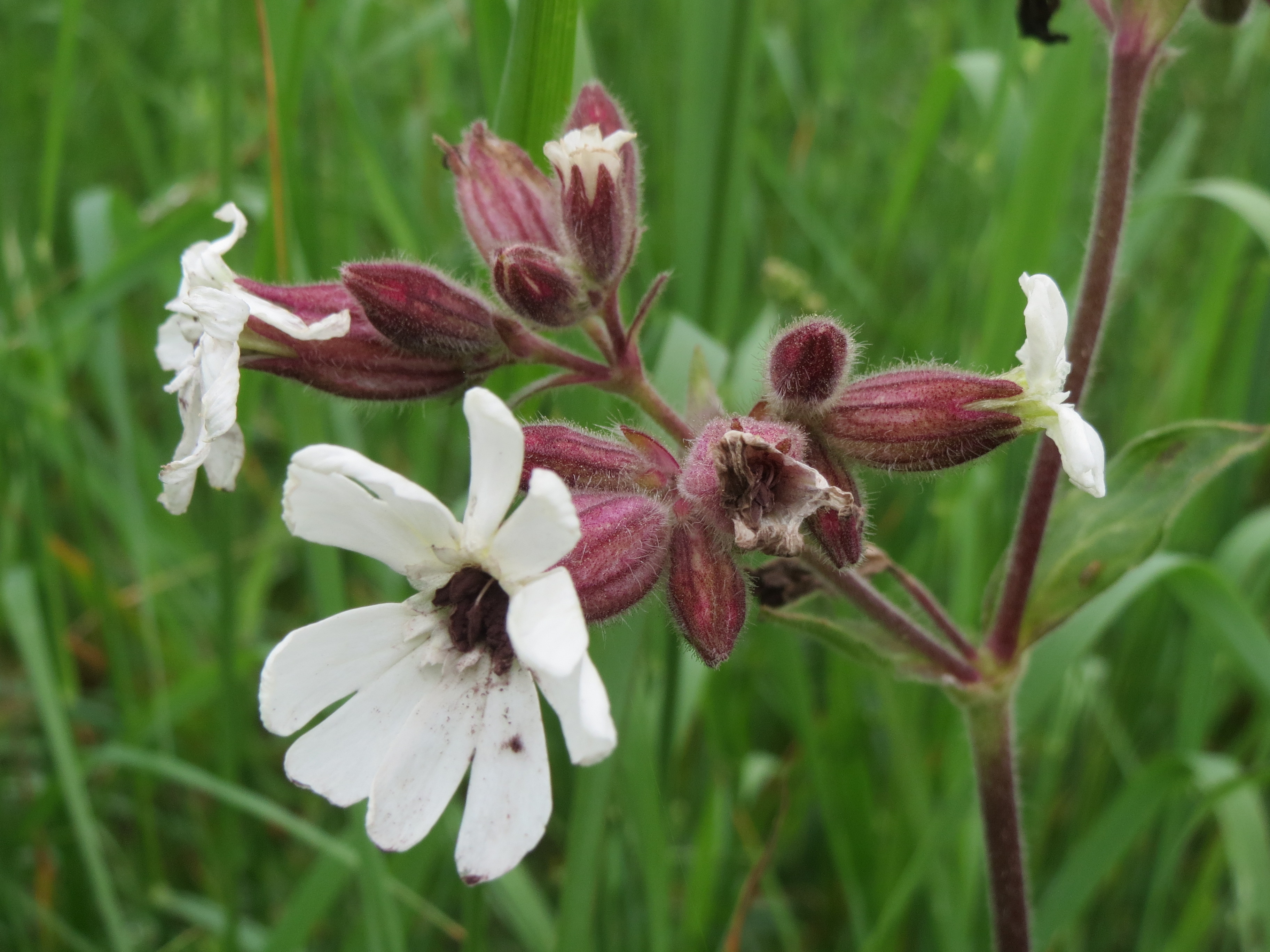 Weiße Lichtnelke (Silene latifolia) im Hockenheimer Rheinbogen